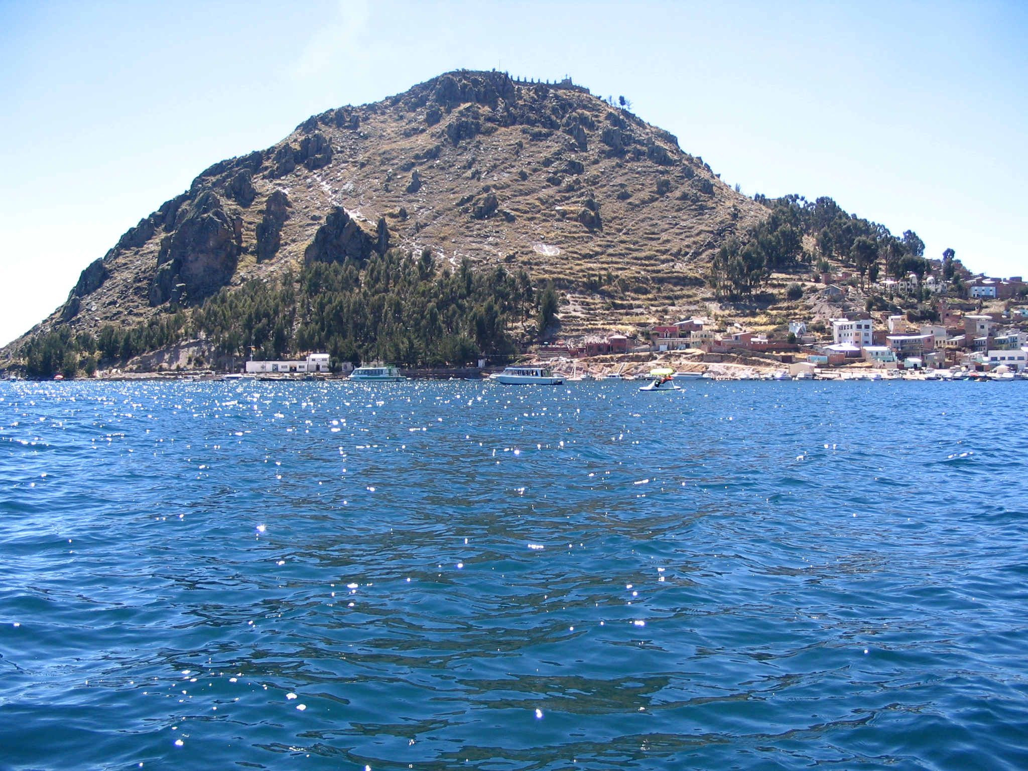 Le Calvaire à Copacabana en Bolivie. Tous les jours, des pélerins viennent prier Jesus.